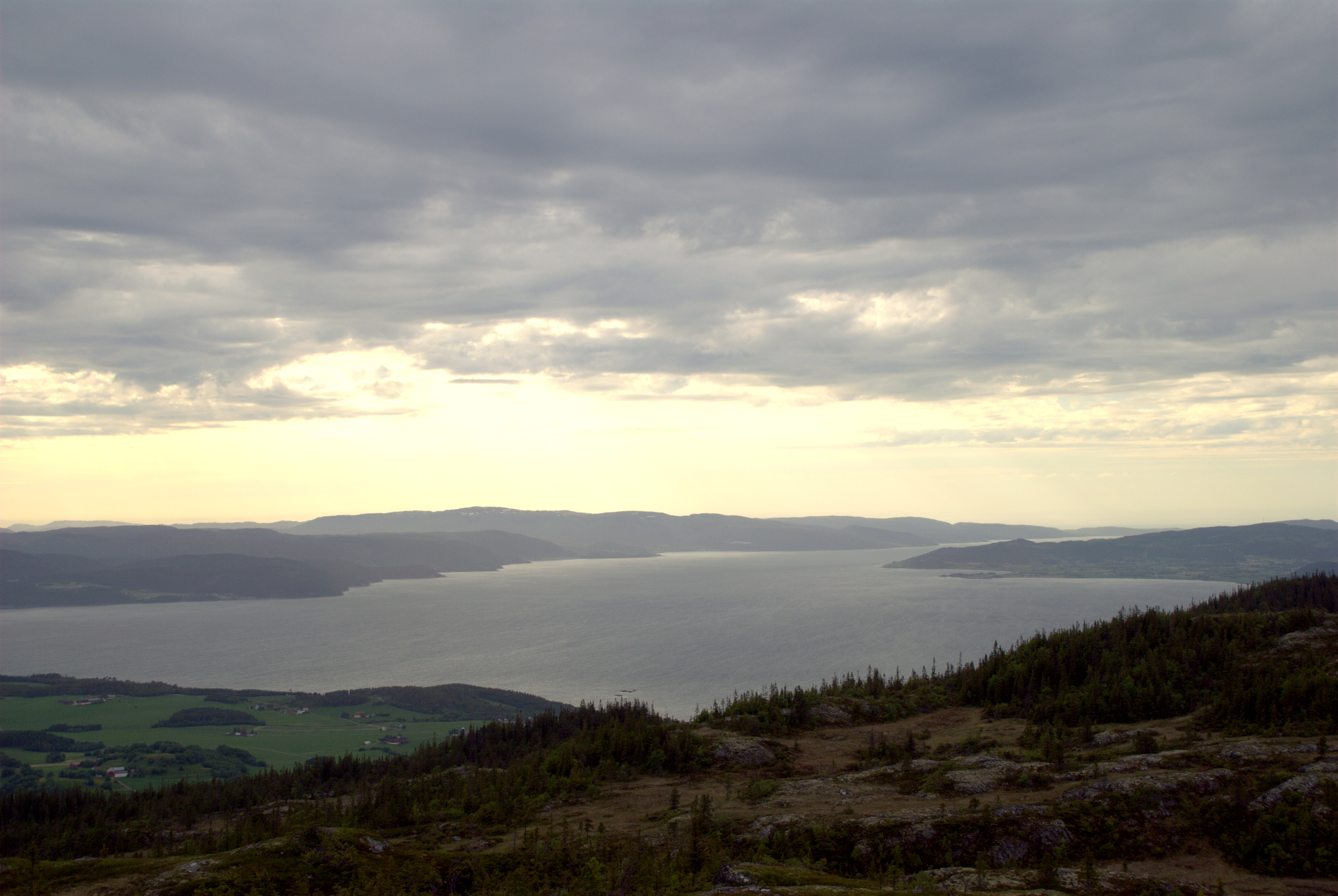 Korsfjorden og Agdenes til venstre med Trondheimsfjorden. Rissa til høyre. Bilde tatt fra Storheia i Bymarka i Trondheim.